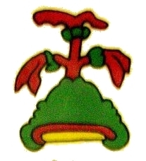 GLIFO DE OAXTEPEC FRAGMENTO DE FOTOGRAFIA DIGITAL EDITADA CON PHOTOMAX(POLAROID)